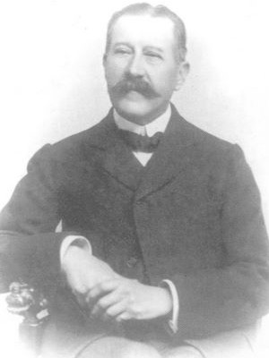 Emilio Santacana y Mensayas, alcalde de Algeciras durante la Conferencia internacional de Marruecos. Imagen tomada con anterioridad a su mandato como alcalde de la ciudad entre 1906 y 1907.